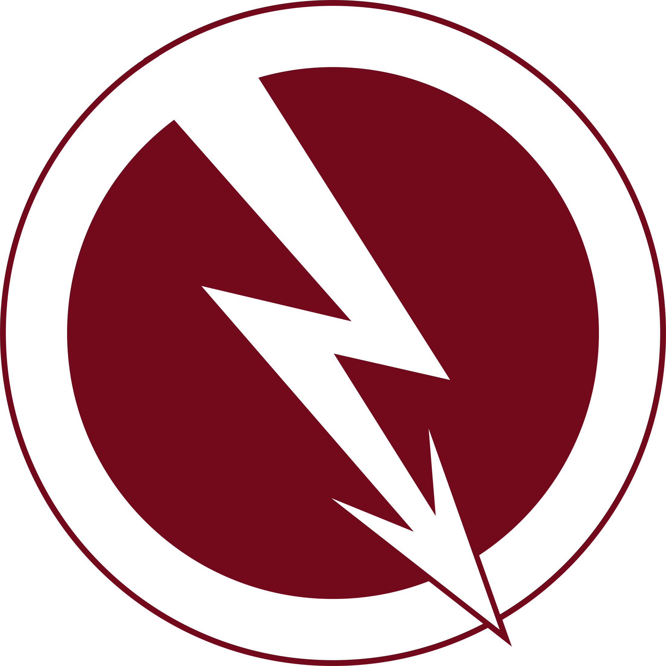 Symbol Narodowo Socjalistycznej Partii Robotniczej